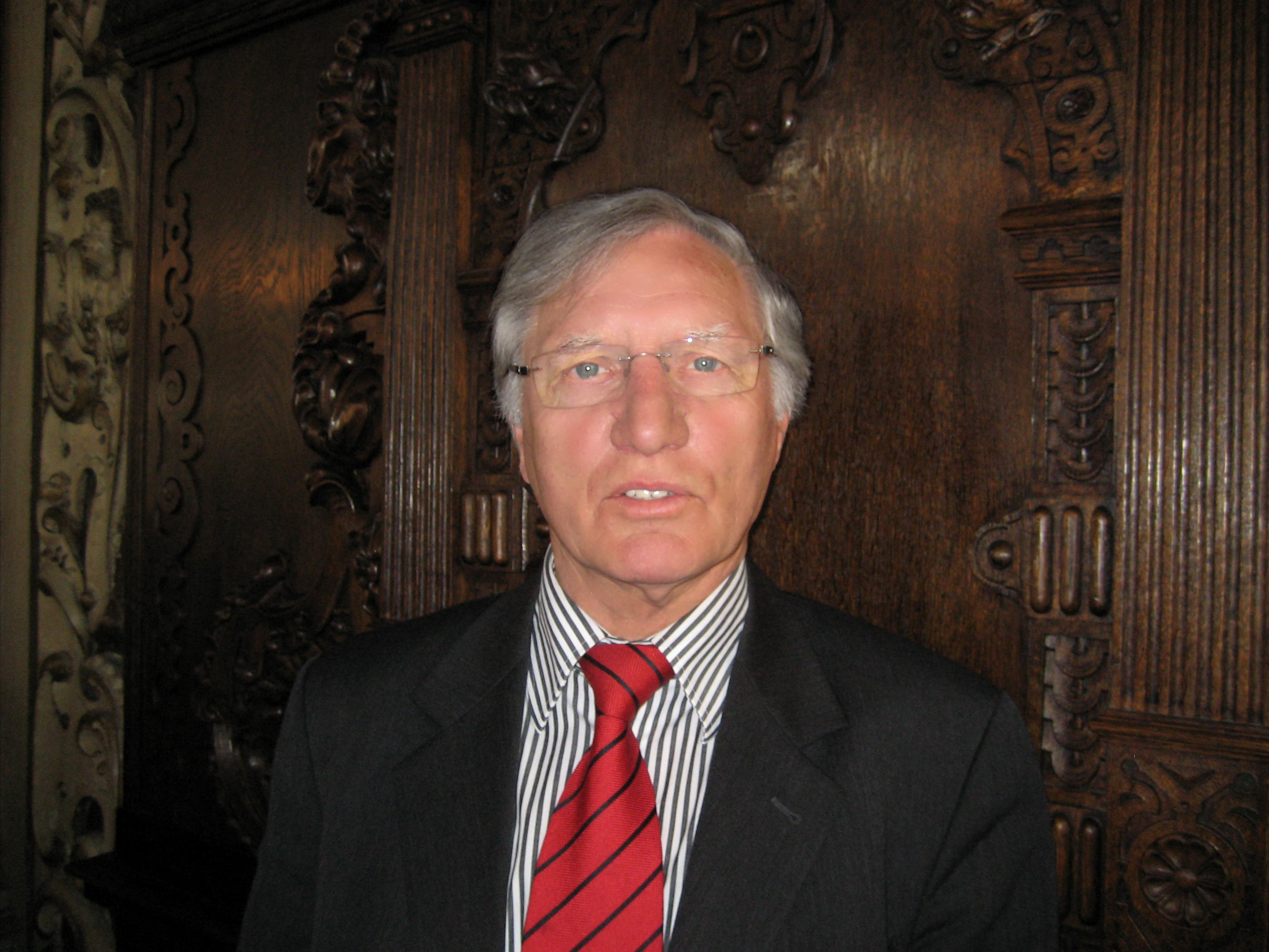 Herbert Brückner (* 8. Oktober 1938 in Schwarme/Hoya) ist ein Politiker der SPD in Bremen, Deutschland, und ist ehemaliger Senator sowie ehemaliger SPD-Landesvorsitzender.